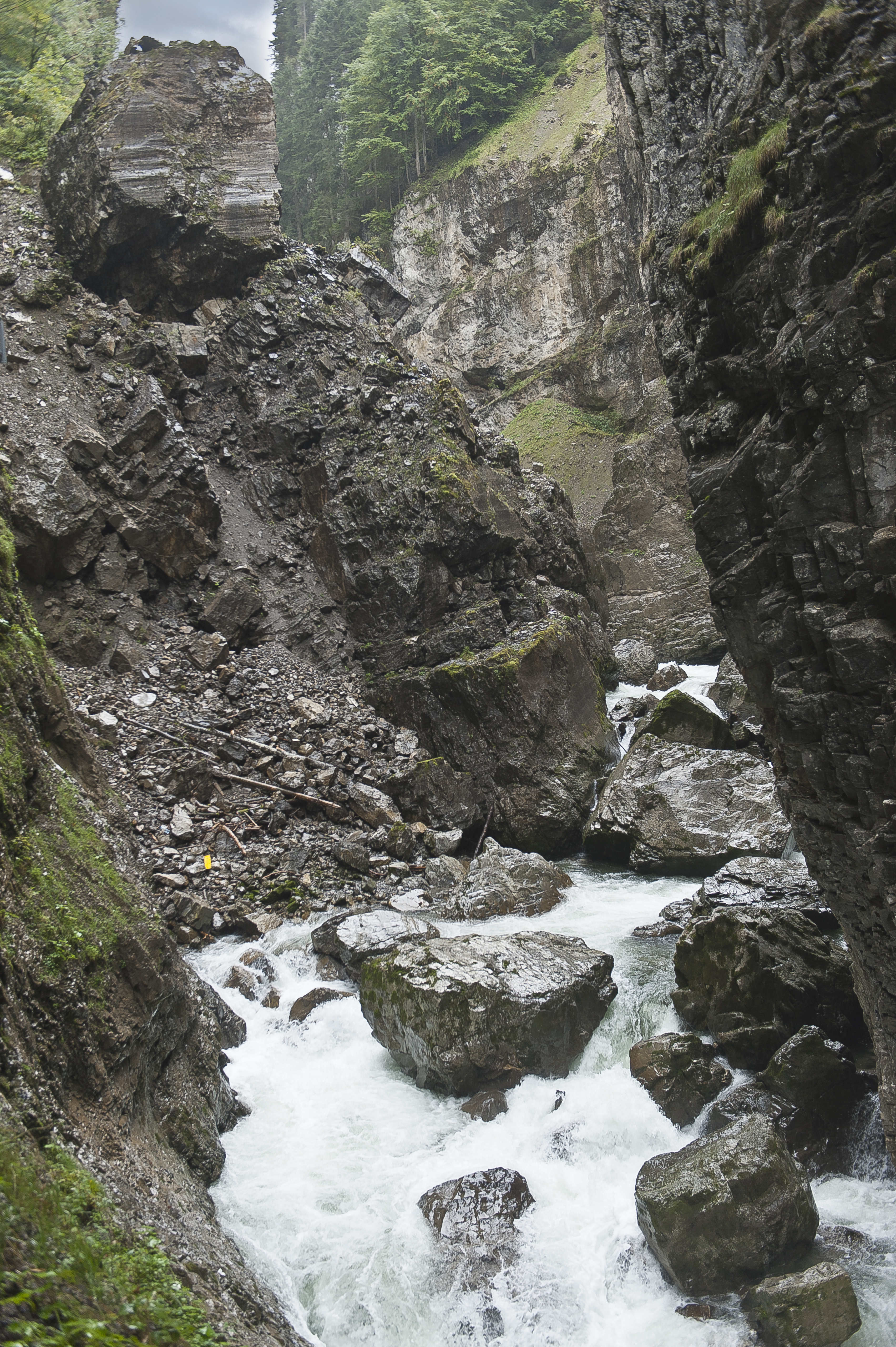 Breitachklamm bei Oberstdorf. Felssturz